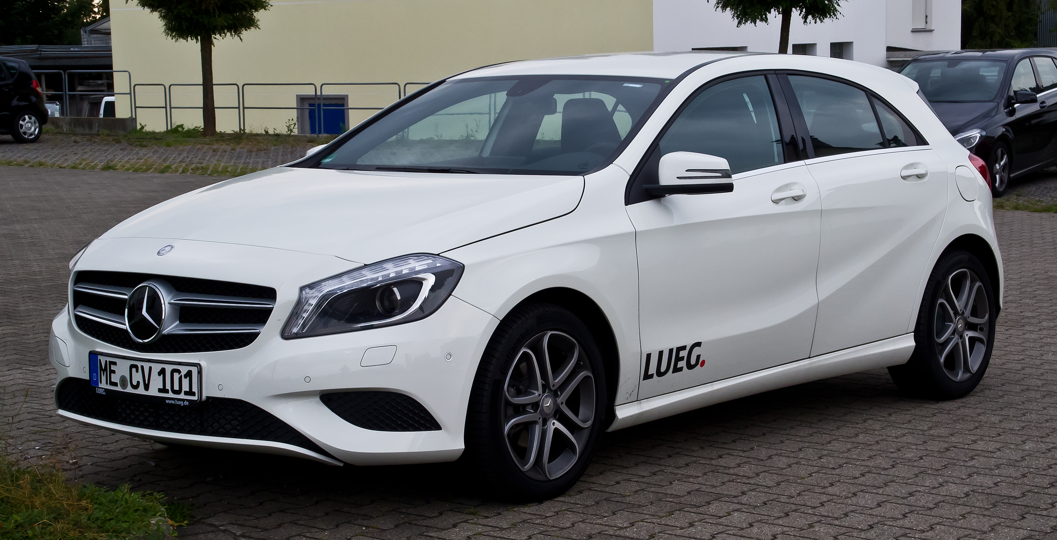 Mercedes-Benz A 180 CDI Urban (W 176)